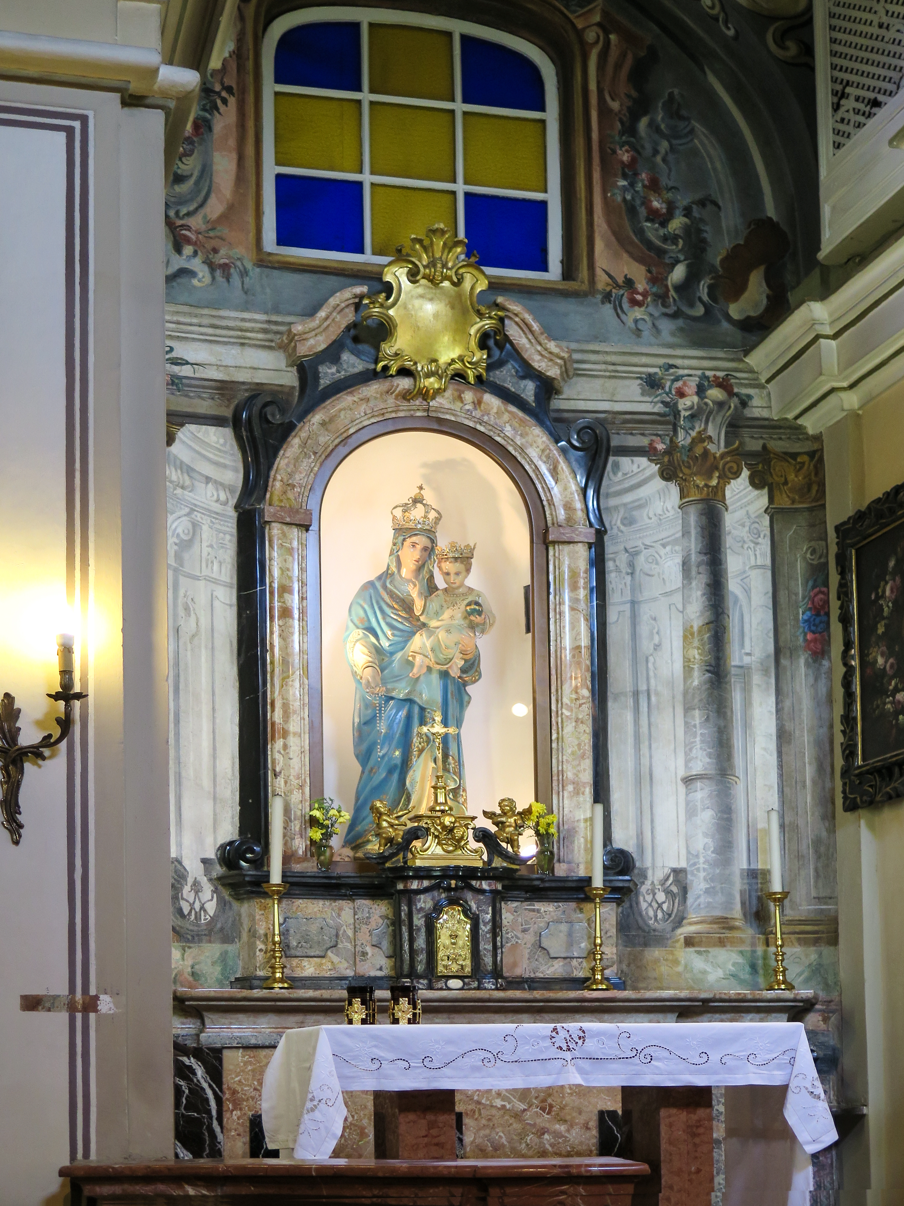 Altare della Chiesa di Santa Maria Immacolata presso la Cascina Increa - Brugherio This file was uploaded as part of WiBrugherio, a project by Comune di Brugherio in cooperation with Wikimedia Italia.